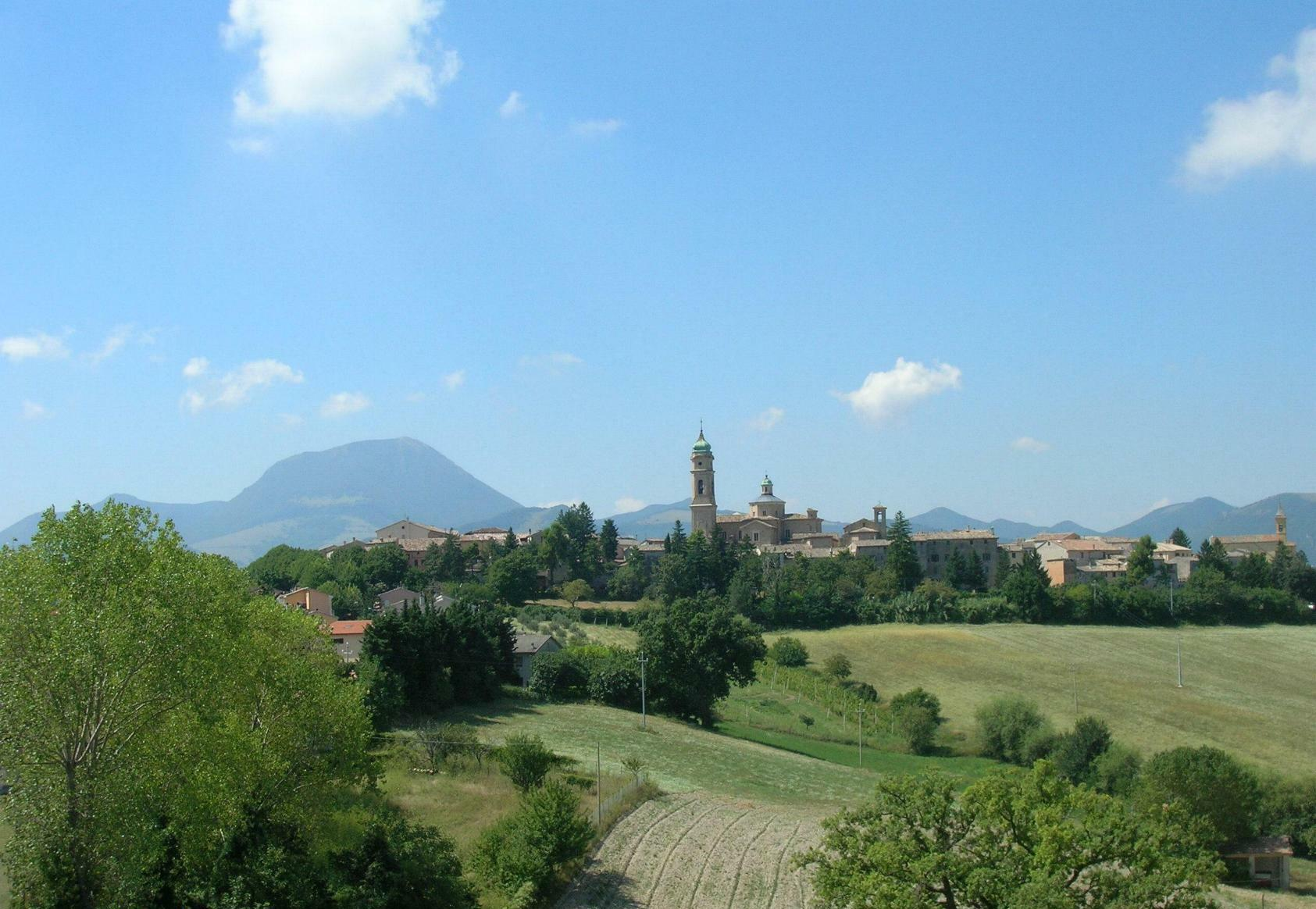 apiro